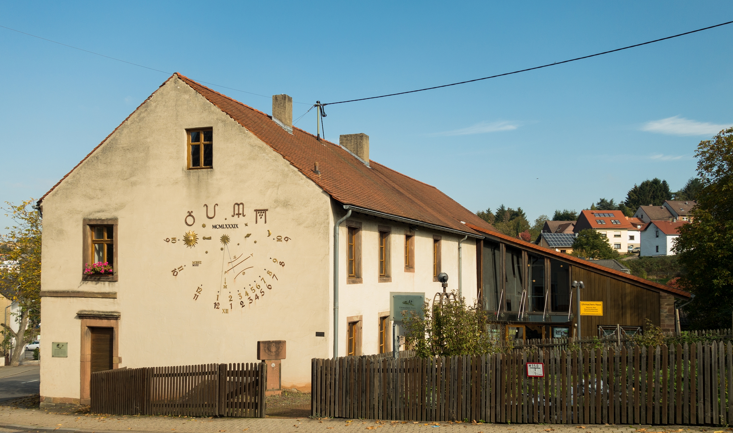 Das Uhrenmuseum, auch Uhrmachers Haus genannt, im Püttlinger Stadtteil Köllerbach. Beispiel für ein Südwestdeutsches Bauernhaus (auch: Südwestdeutsches Einhaus).